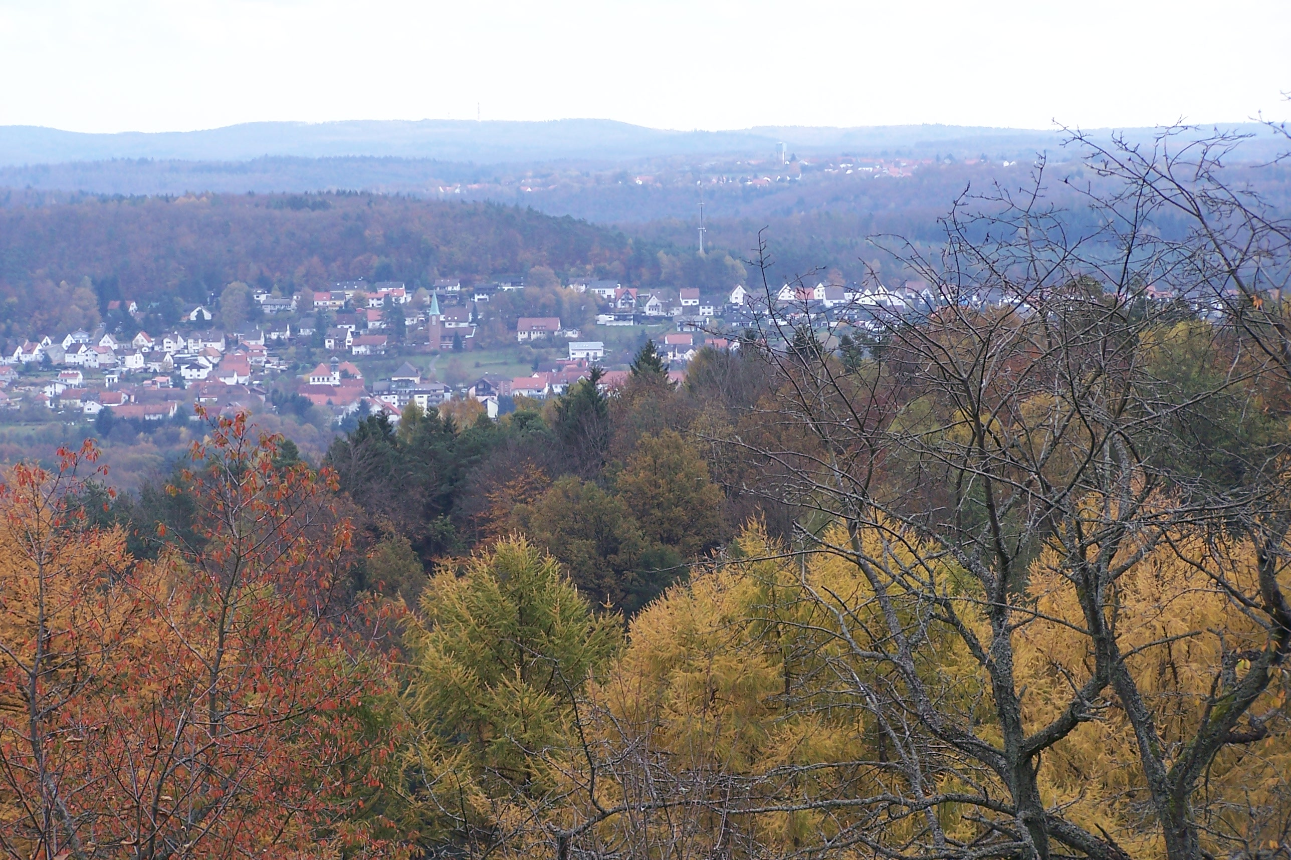 Ortsansicht von Schopp in Rheinland-Pfalz, von Krickenbach aus gesehen.